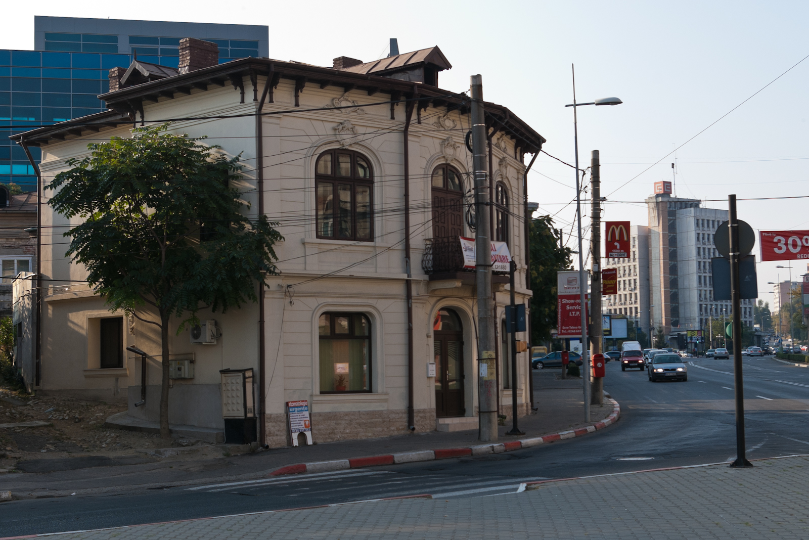 Fotografia prezinta Casa Ghimpa din Pitesti vazuta dinspre N.